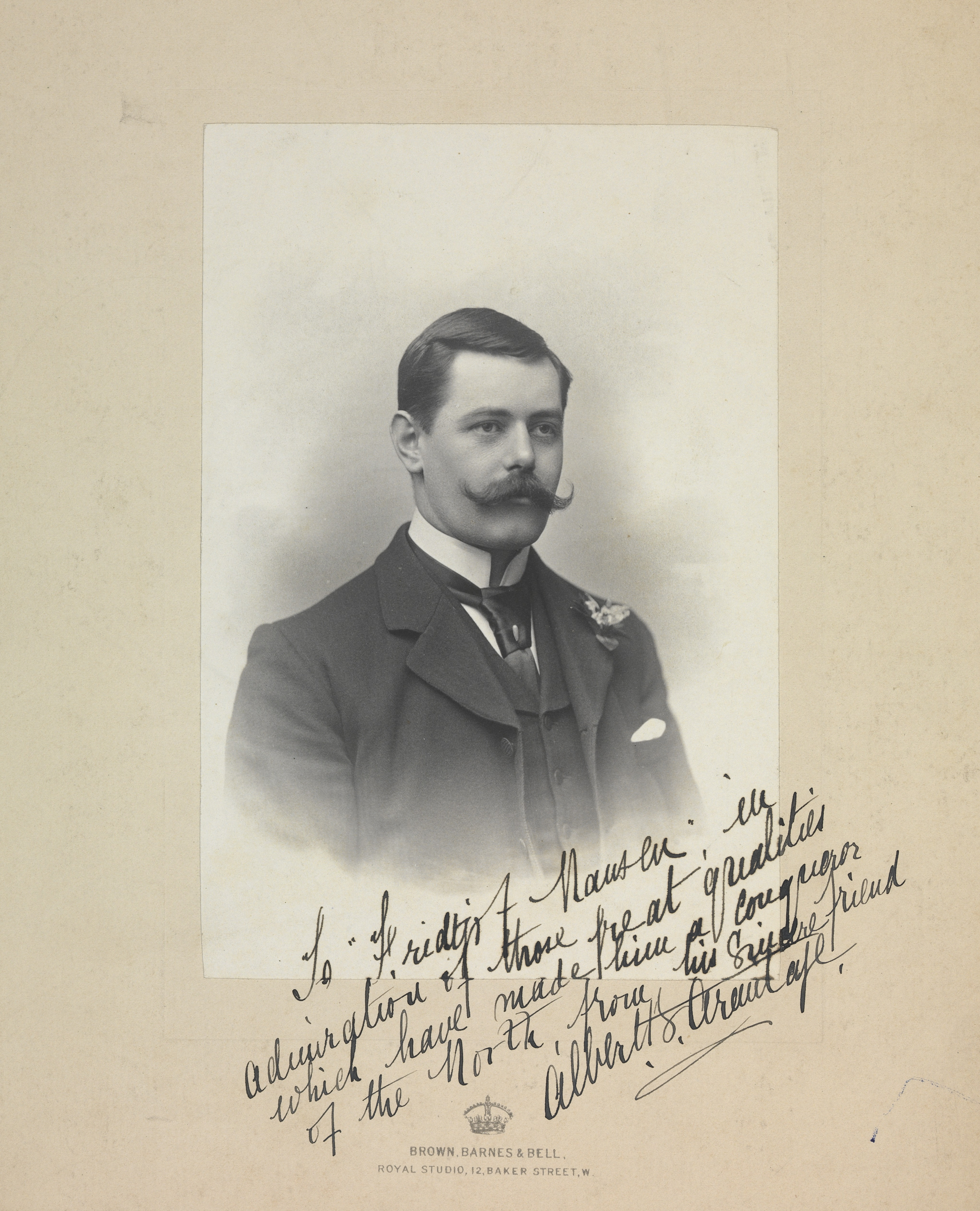 Albert L. Armitage. Med dedikasjon. Depicted person: Armitage, Albert L. Depicted place: Storbritannia, London